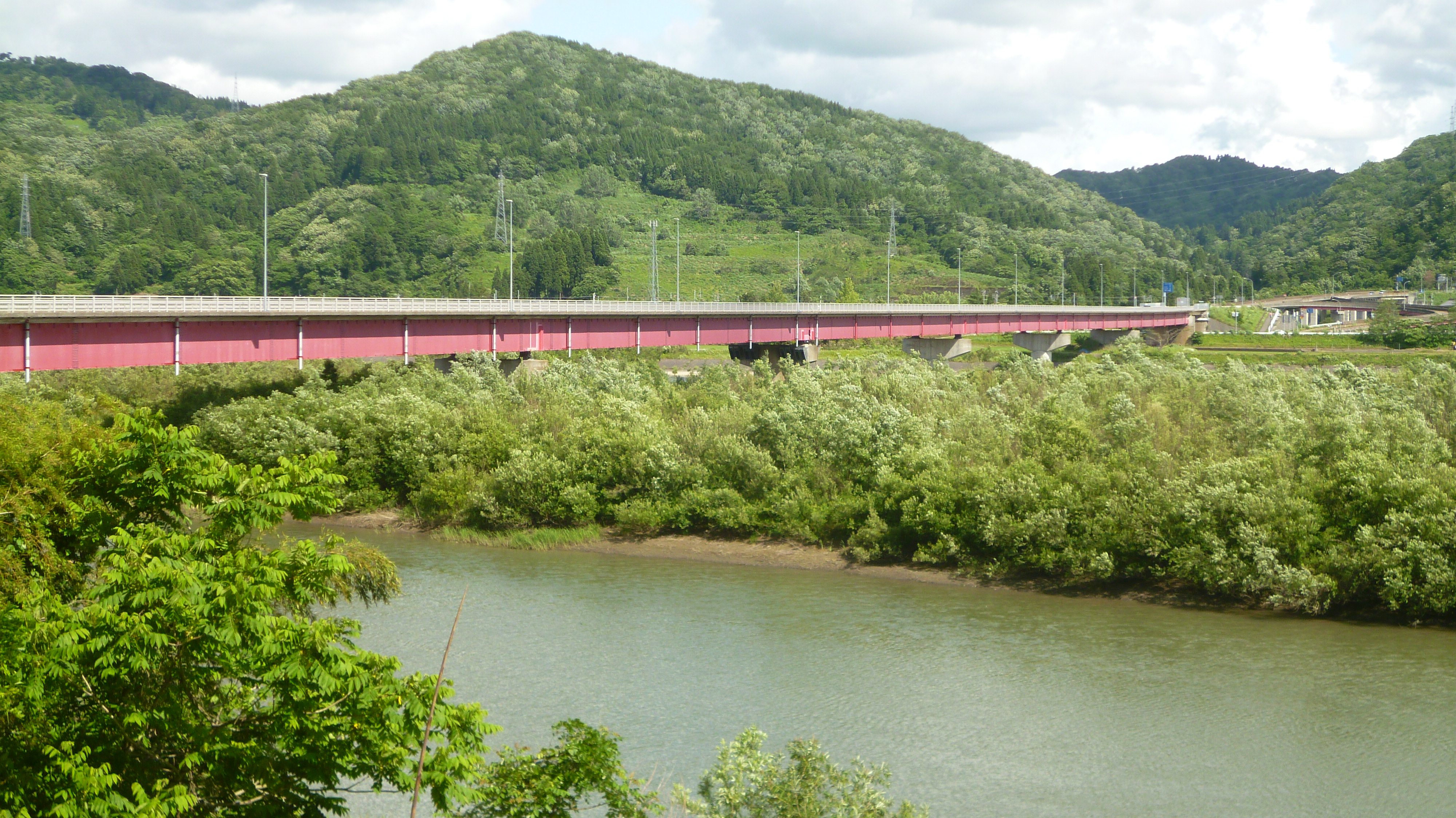 小千谷大橋。左岸より撮影。